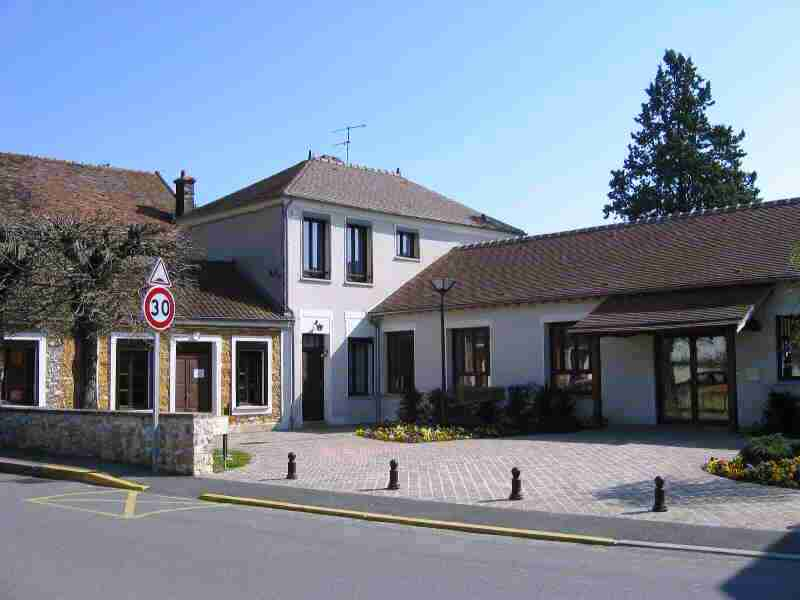 Hôtel de ville de Voisenon (77)